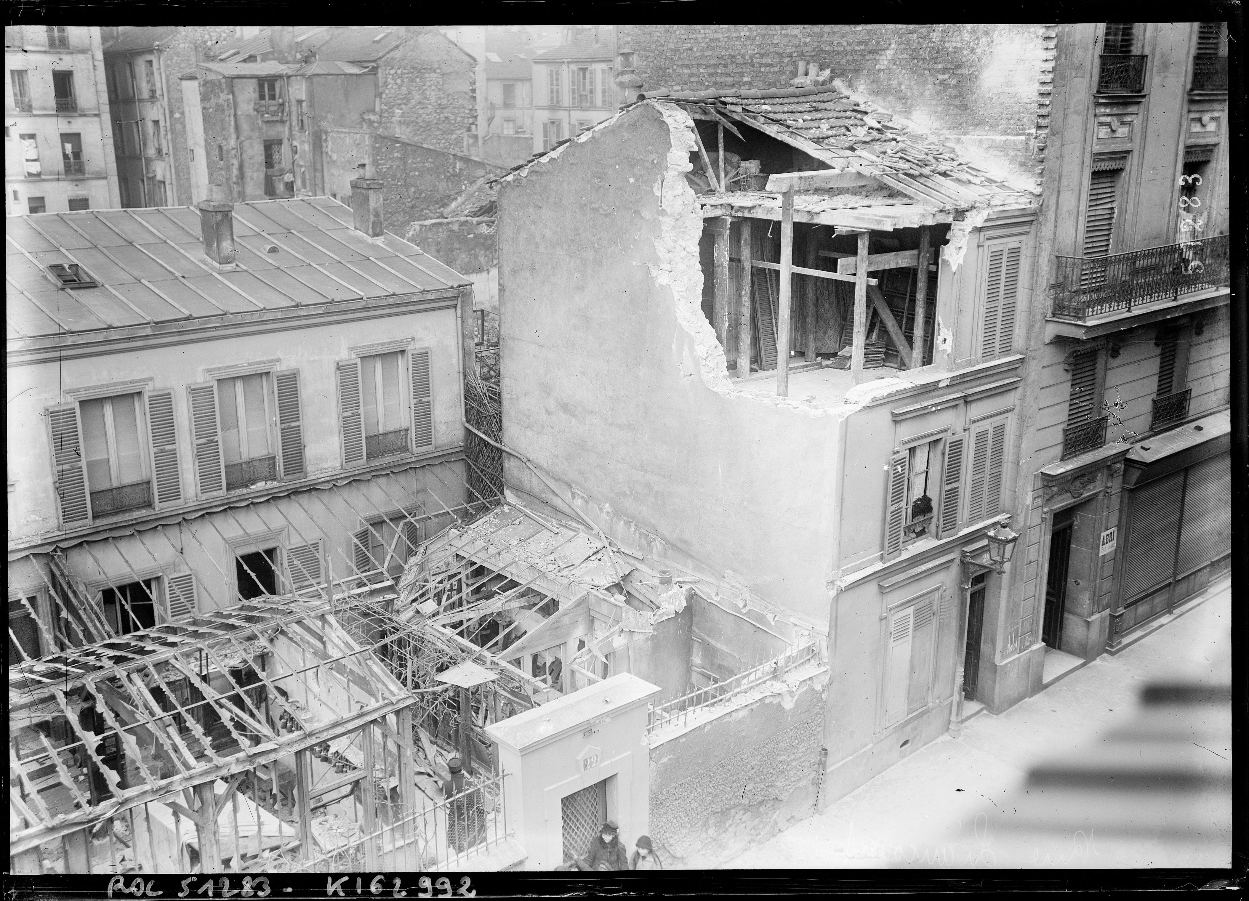 Rue Liancourt, Paris XIVe arrondissement, dégâts dûs aux bombardements à longue portée des 23-24 mars 1918, photographie de presse, Agence Rol.De gauche à droite: n° 22 (touché le 23 mars 1918, à 10h30, n° 20 et n° 18 (qui subsiste en 2018) - Cf. Liste des points de chute des obus lancés sur Paris ... du 23 mars 1918 au 9 août de la même année où figure le 22 rue Liancourt.